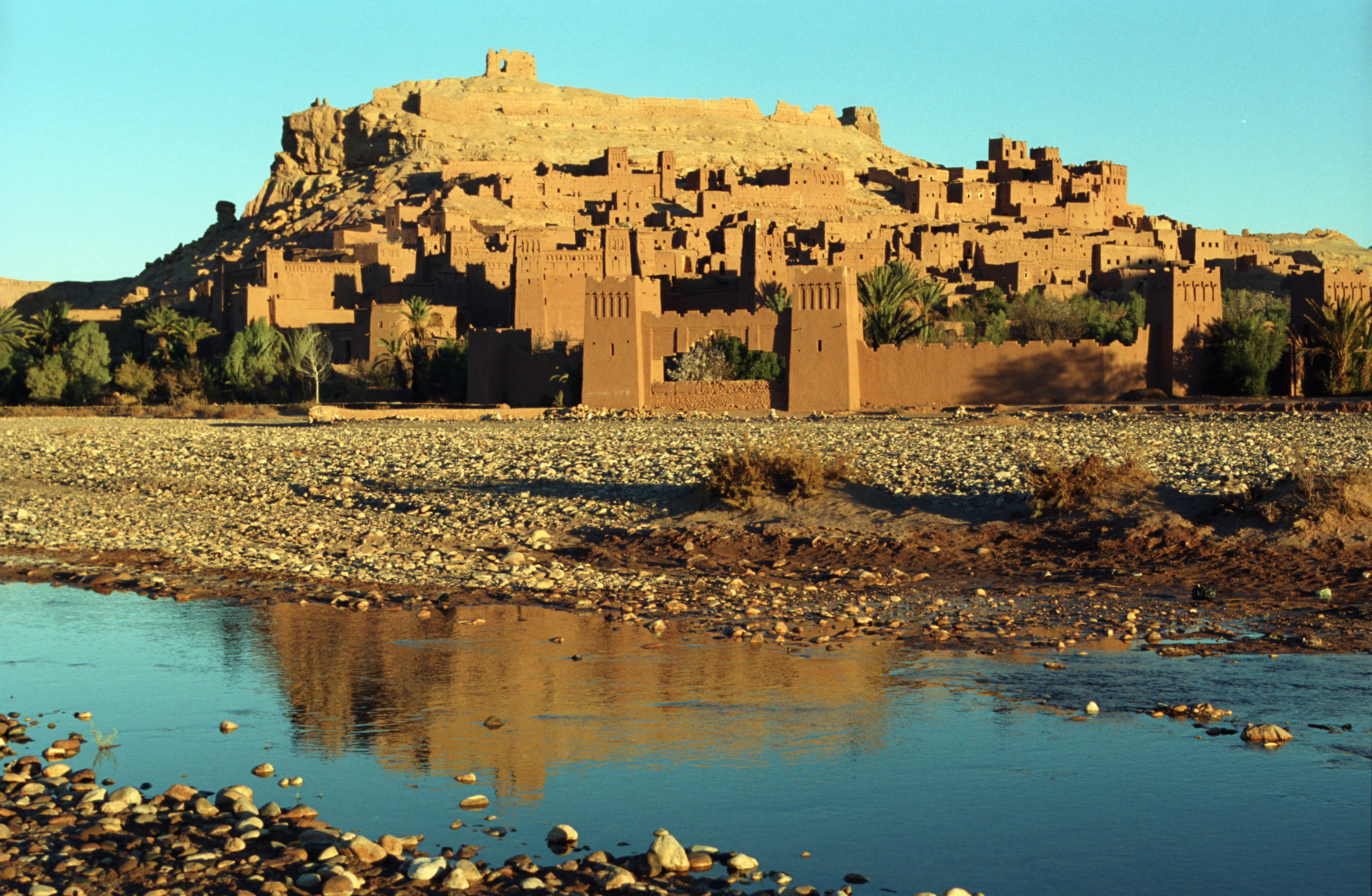 Aït Benhaddou